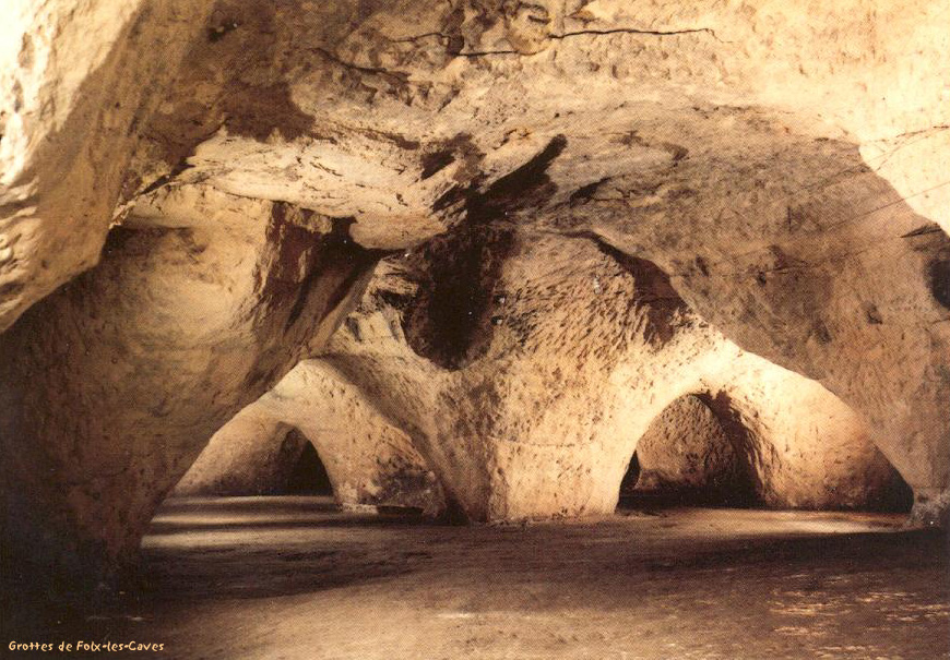 Grottes de Folx-les-Caves